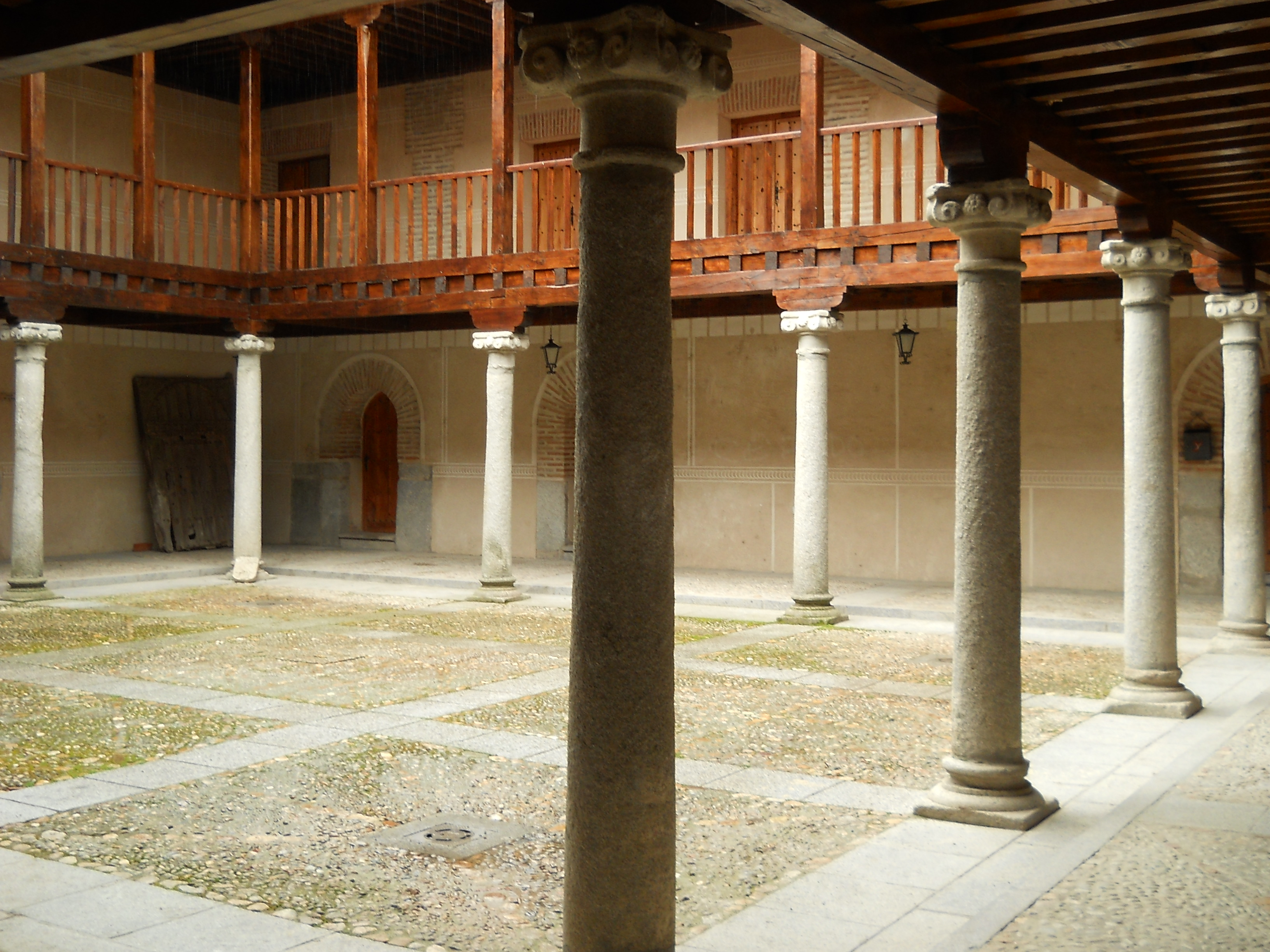 Patio del Hospital Real o de la Purísima Concepción, Madrigal de las Altas Torres, Ávila, España